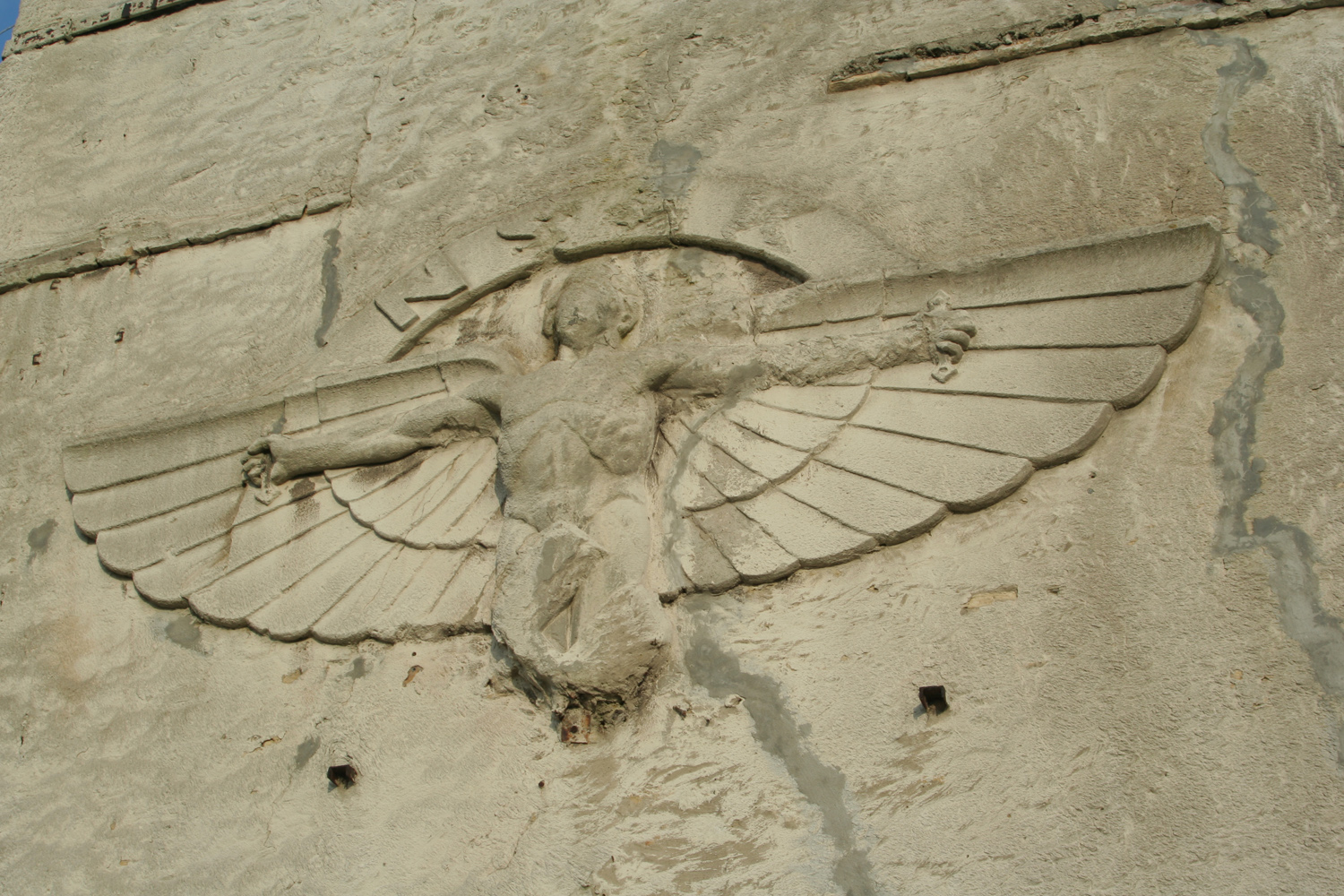 Zdjęcie przedstawia fragment pieca z płaskorzeźbą IKARA wykonane przez NSFK